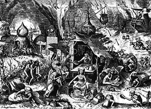 Todsünde Geiz, Holzstiche